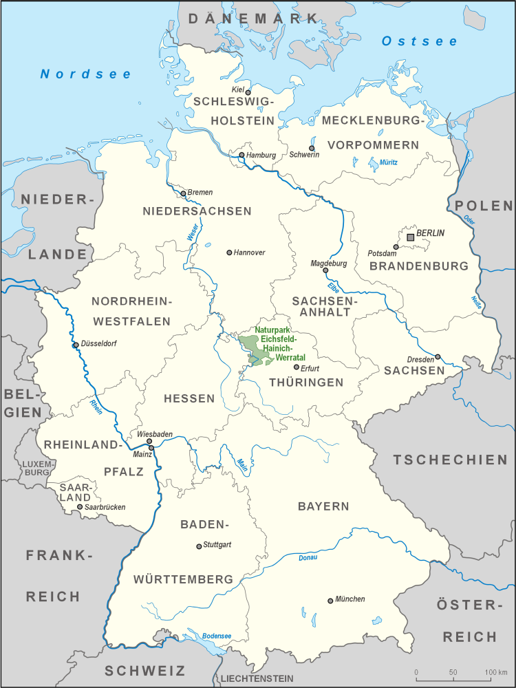 Karte des Naturparks Eichsfeld-Hainich-Werratal in Deutschland